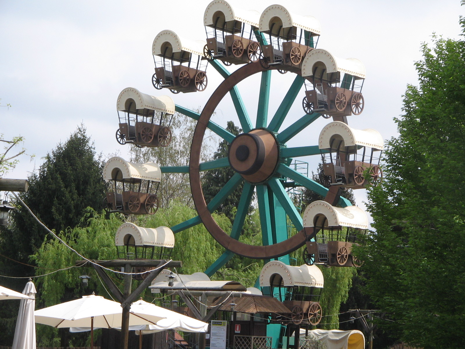 Ruota dei Pionieri - Minitalia Leolandia Park